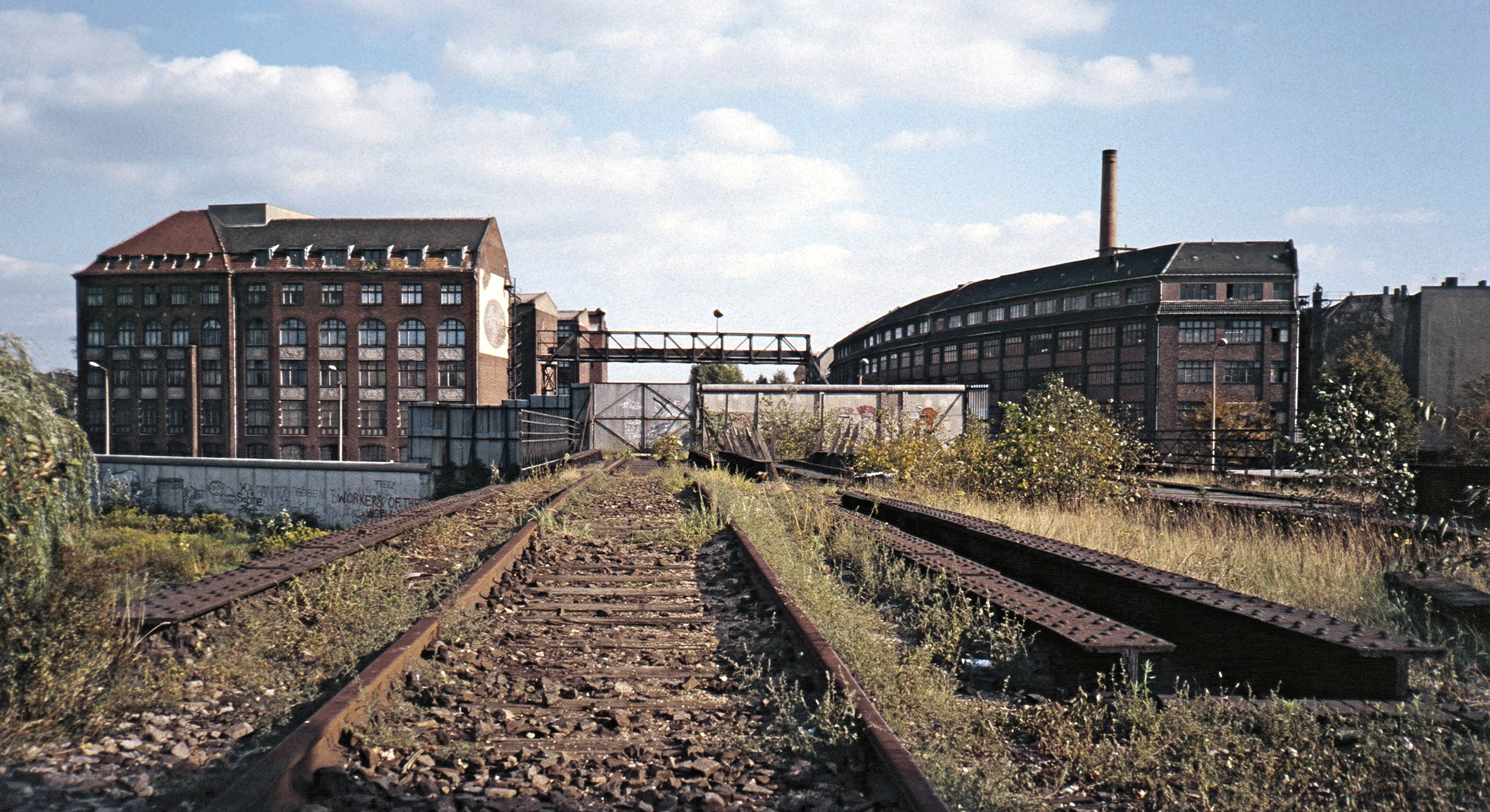 Tor für die Güterzüge und Beschaubrücke der DDR-Grenzsoldaten über den Landwehrkanal an der heute stillgelegten Strecke zum ehemaligen Görlitzer Bahnhof